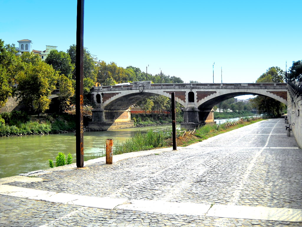 Ponte Sublicio (o Aventino) in Roma. Congiunge il rione Trastevere con quello di Testaccio.